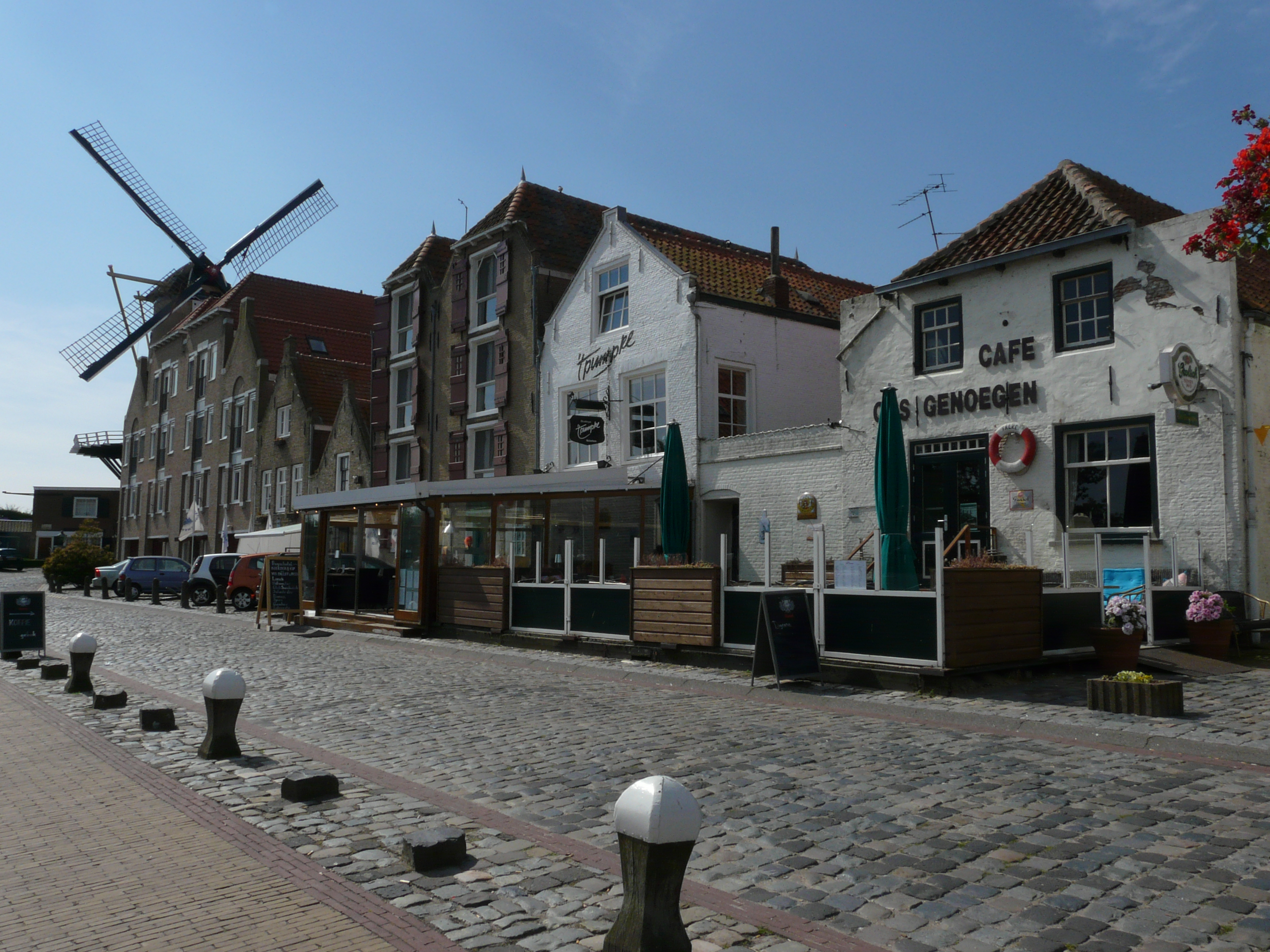 Zicht op een deel van de straat de Benedenkade. Gelegen bij de haven van Willemstad in het centrum van Willemstad in de noordwesten van de provincie Noord-Brabant